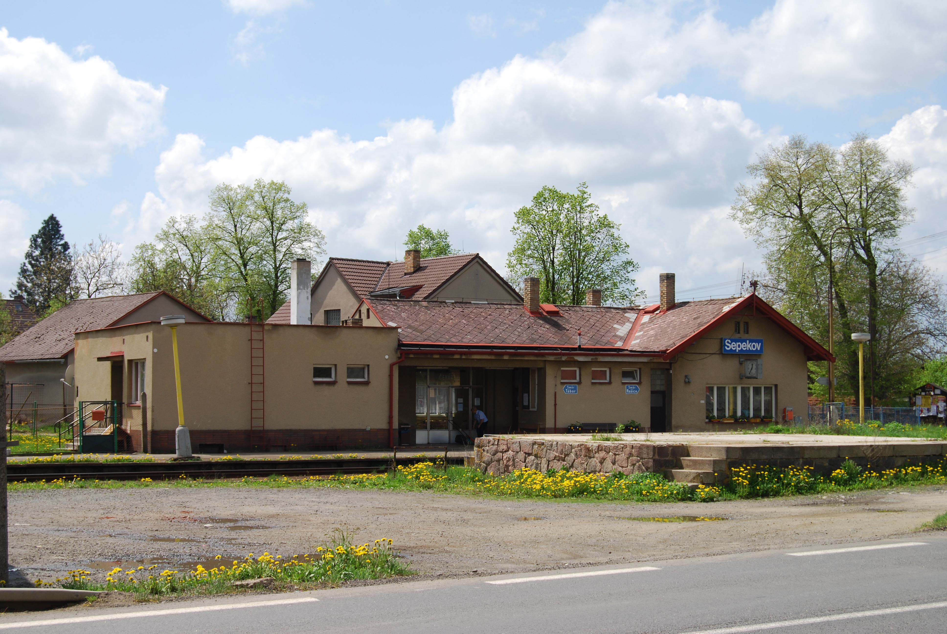 Železniční zastávka. Sepekov v okrese Písek, kraj Jihočeský. Česká republika.